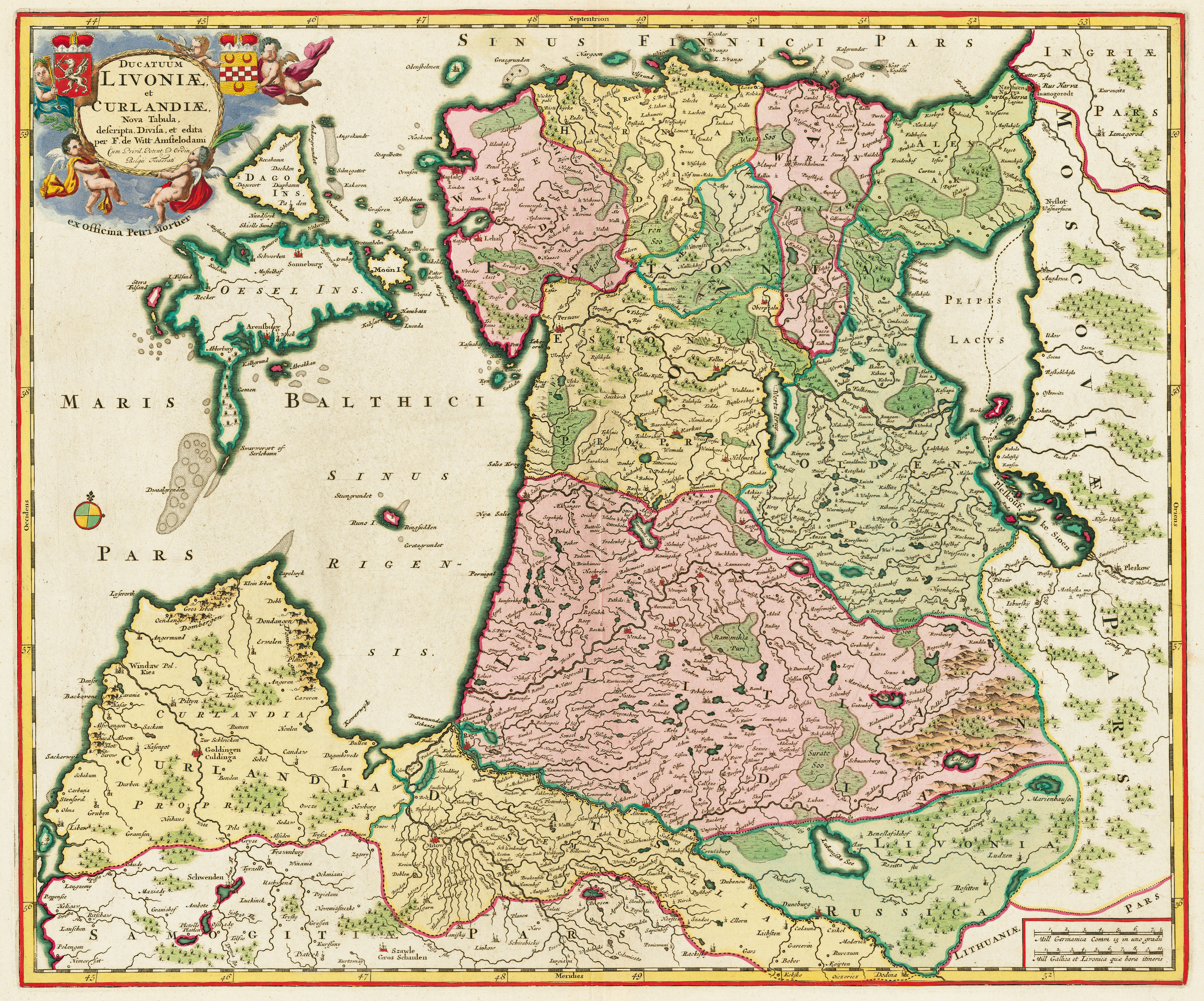 Ducatuum Livoniæ et Curlandiæ nova tabula Published in Amsterdam. Copper engraving, 1:1 000 000, 49 x 41 cm.